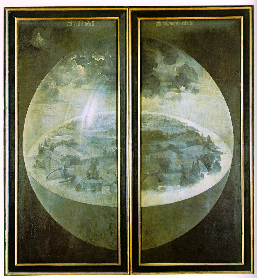 Exterior (shutters) of The Garden of Earthly Delights. Dargestellt ist der Zustand der Erdkugel am Ende des dritten Schöpfungstages, wo die Trennung zwischen Licht und Finsternis, Himmel und Erde, Wasser und Land bereits vollzogen ist (Genesis 1,1-13). Der Maler sieht die Erdoberfläche als Scheibe, integriert diese aber schon in eine Kugel, wobei der untere Teil mit Wasser gefüllt ist.